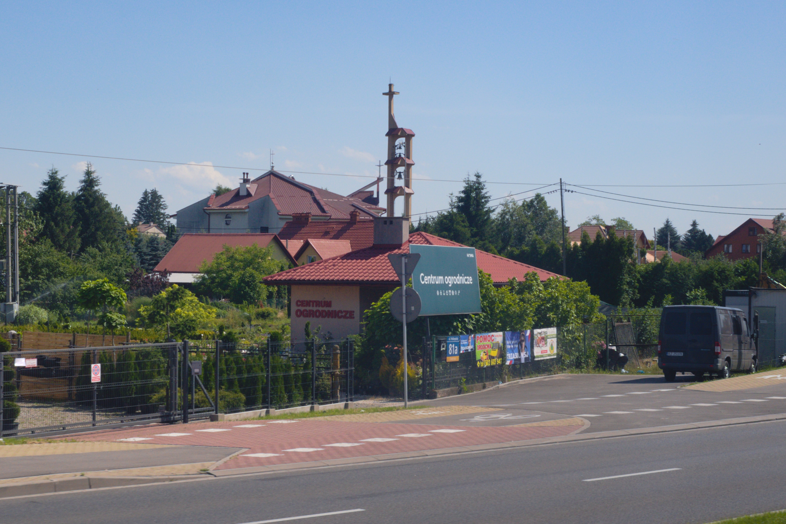 kościół św. Józefa w Rzeszowie-Zwięczycy, widok z ul. Podkarpackiej, z autokaru